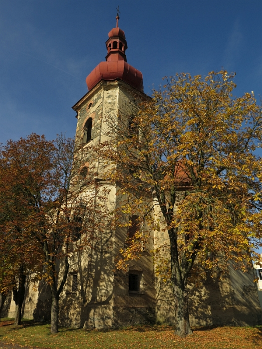 Kostel Nanebevzetí Panny Marie, Březí (Pernarec).